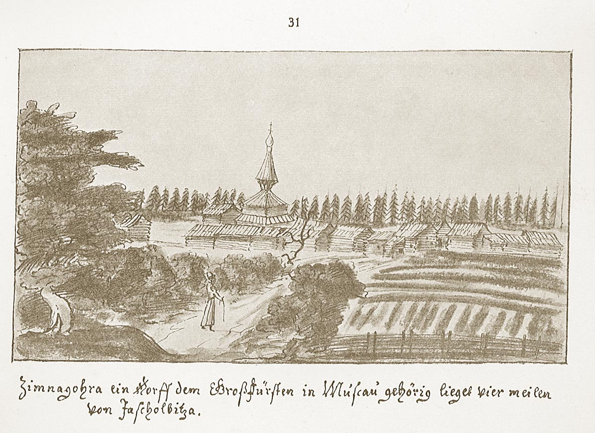 Зимогорье